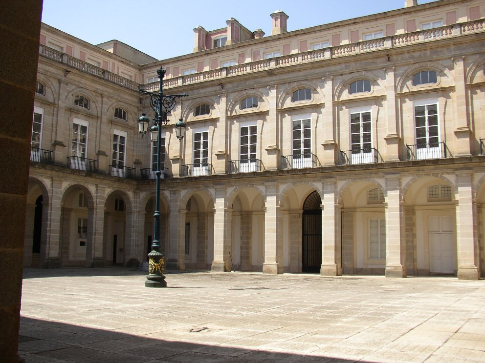 Segovia. (Castilla-León. España) Riofrío. Pabellón Real de caza. Patio interior. Fotografía realizada el 1 agosto de 2004 por el autor.User:Pelayo2.